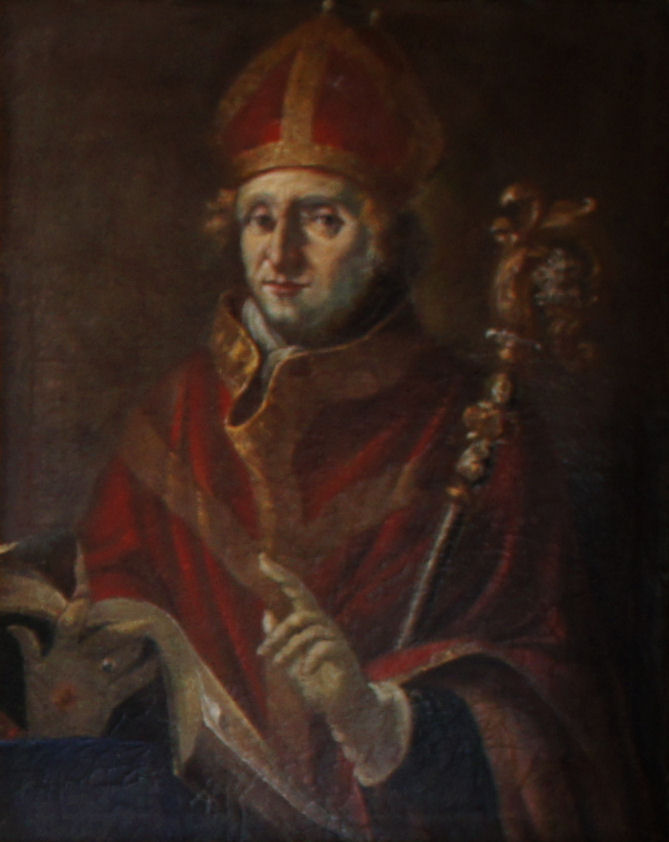 Porträtgemälde von Johannes I. Wulfing, Fürstbischof von Freising, im Fürstengang zwischen Fürstbischöflicher Residenz und Freisinger Dom.